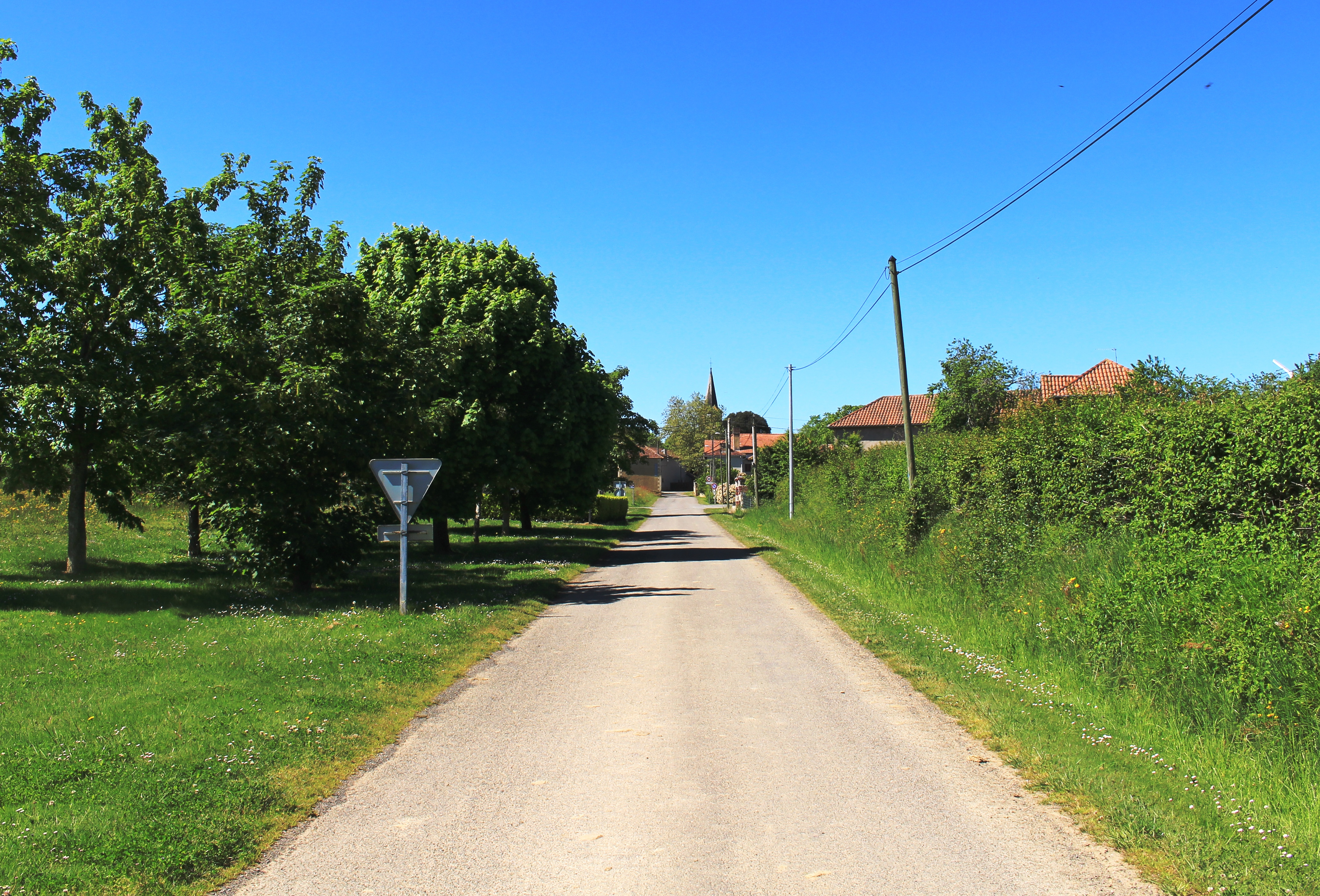 Bernadets-Debat (Hautes-Pyrénées)